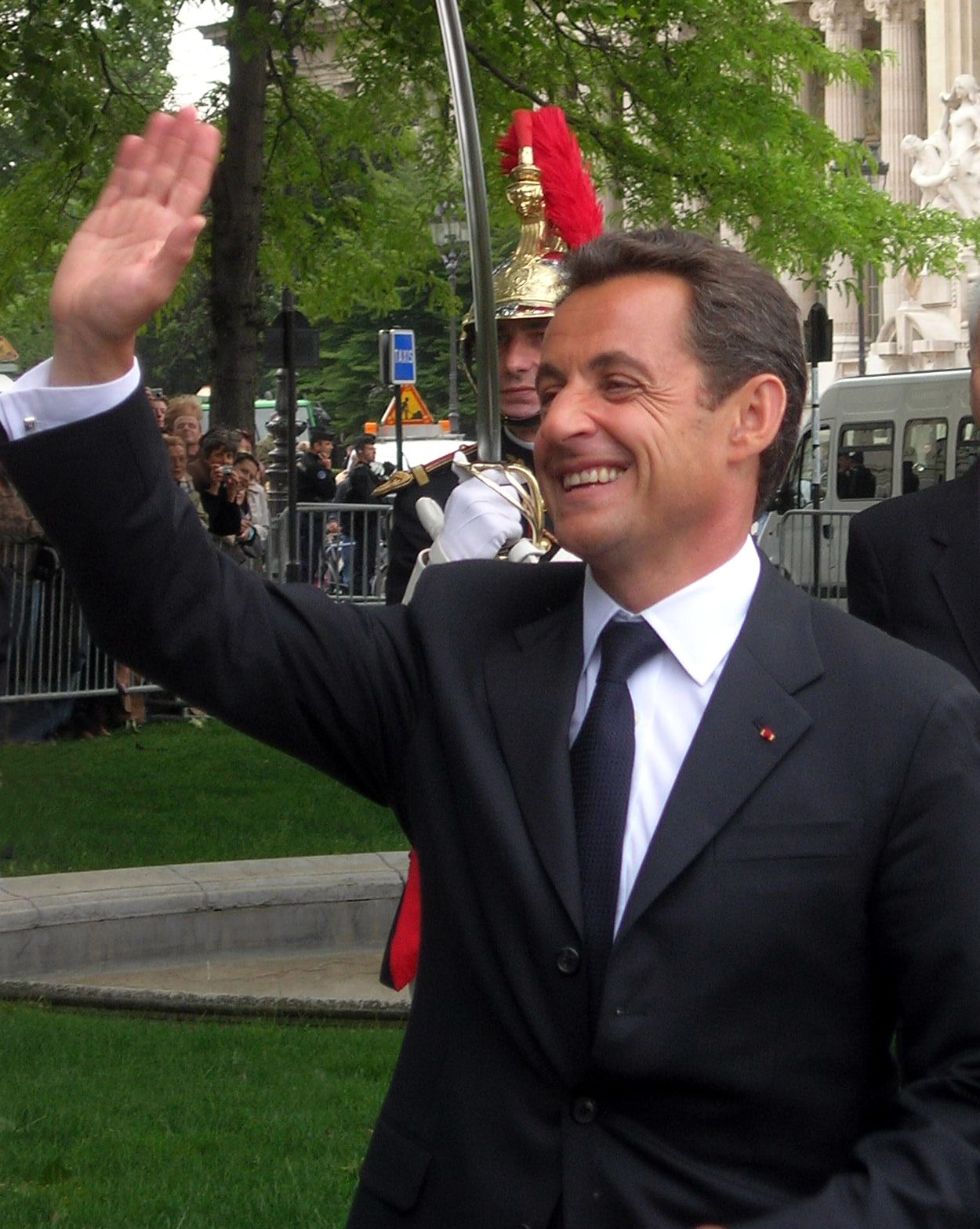 Le président Nicolas Sarkozy le 16 mai 2007